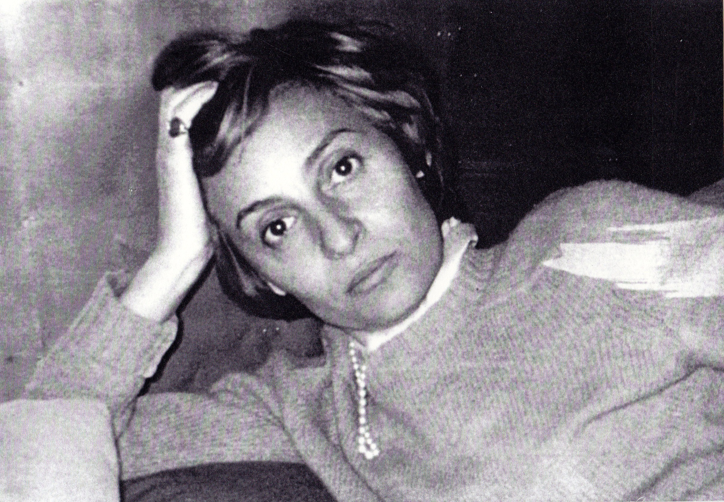 Simone (1970 ou 1980 ?), photographiée par Erika avec un de premiers Polaroid